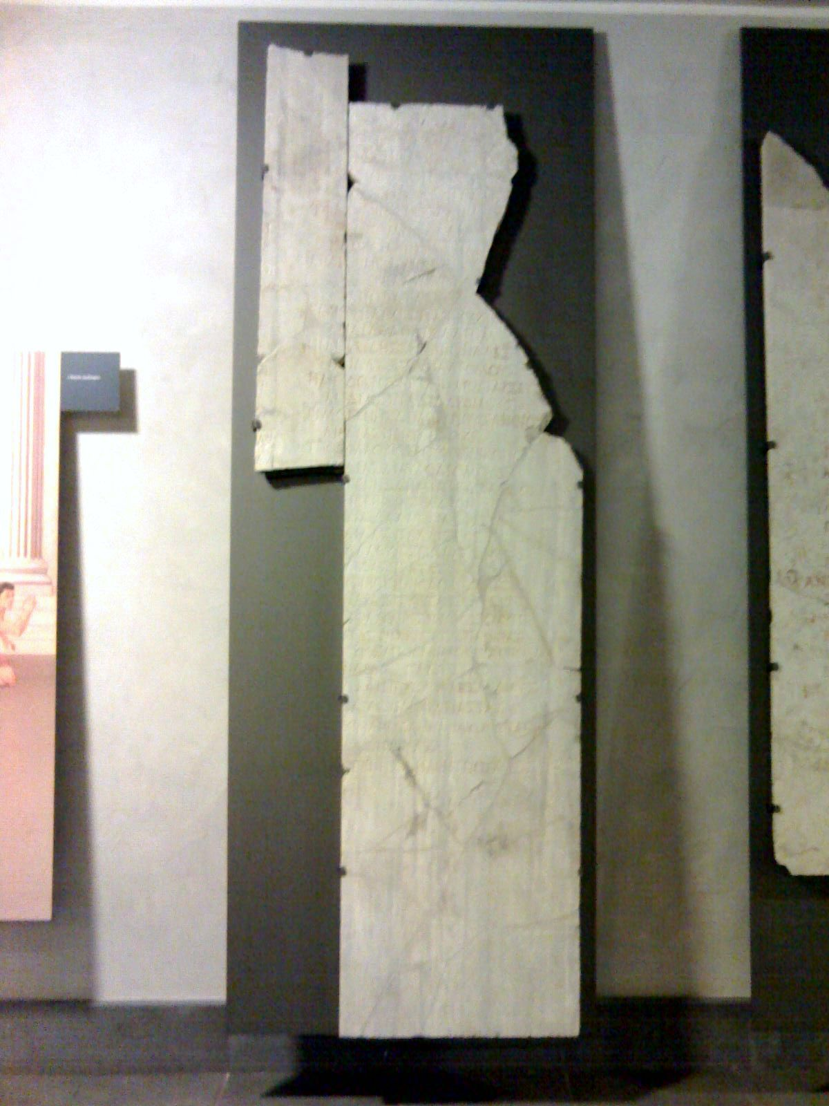 Alcuni reperti del Museo Stazione Neapolis di Napoli. Si tratta di un'epigrafe dei vincitori della varie pratiche sportive eseguite nei giochi Isolimpici